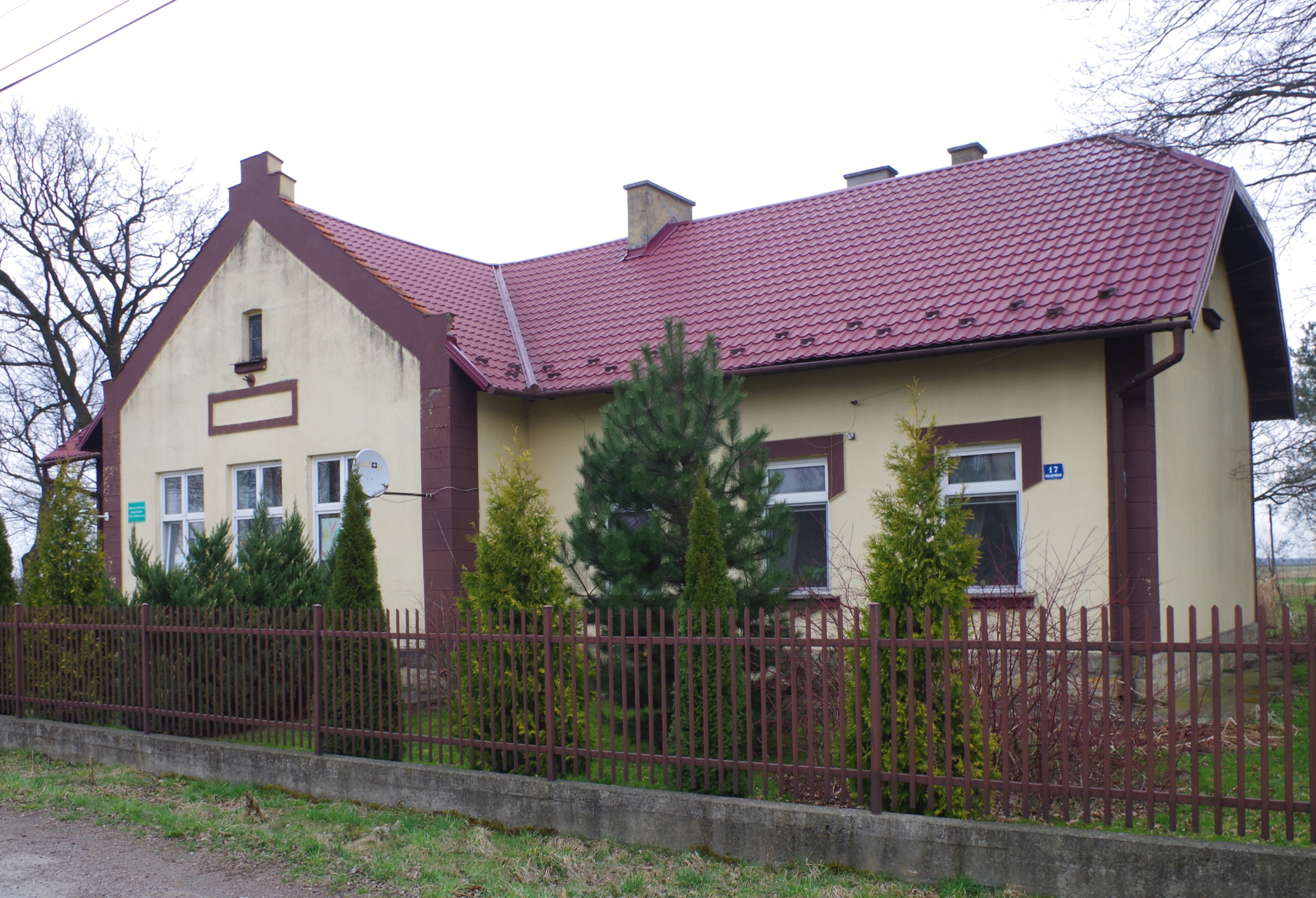 Biblioteka w Majkowicach